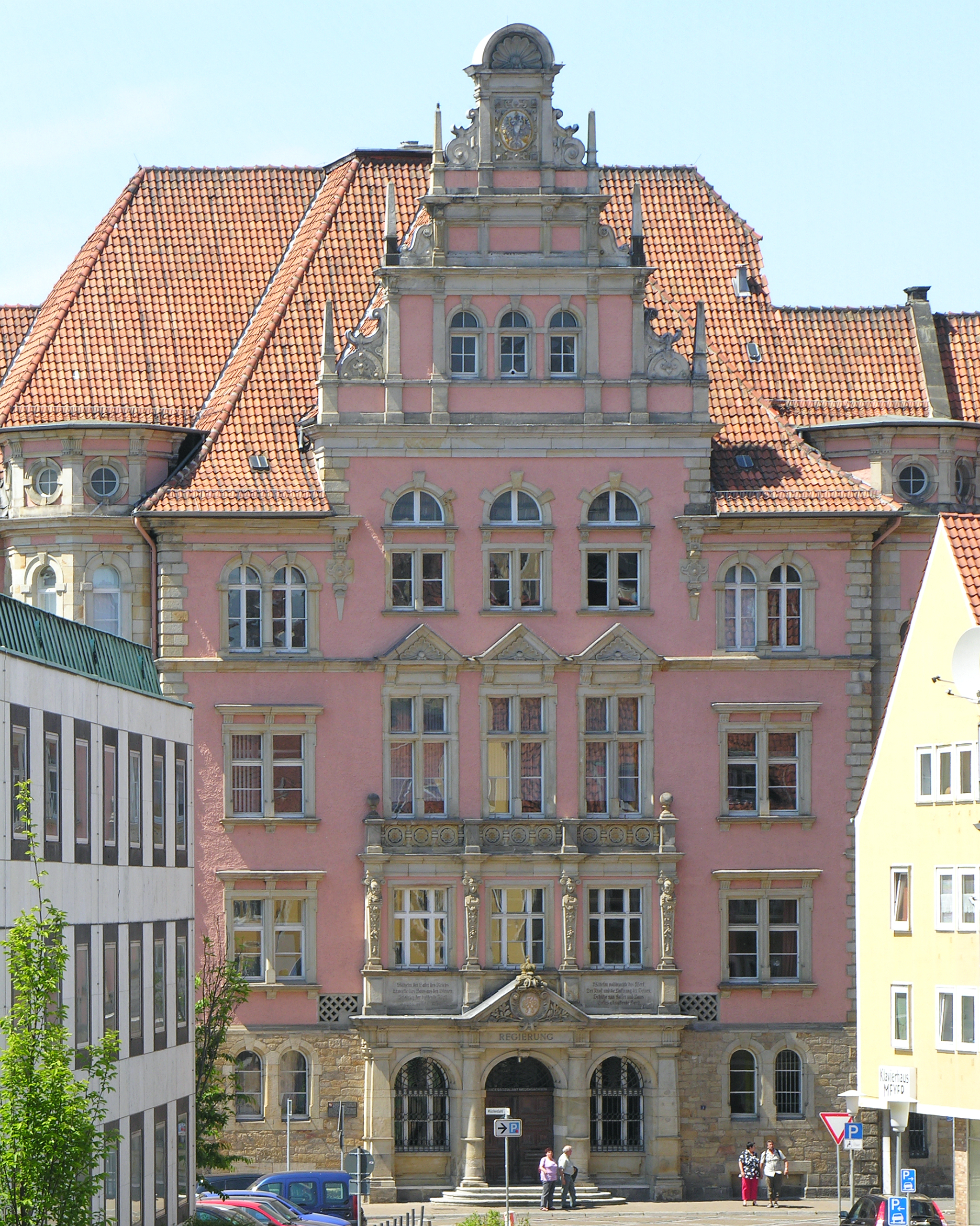 Ehemaliges preußisches Regierungsgebäude, fertiggestellt 1889, in Hildesheim am Domhof 1 (view from Kreuzstr). Planer und Architekt A.Algermissen. Foto Wolfgang Pehlemann DSCN2258